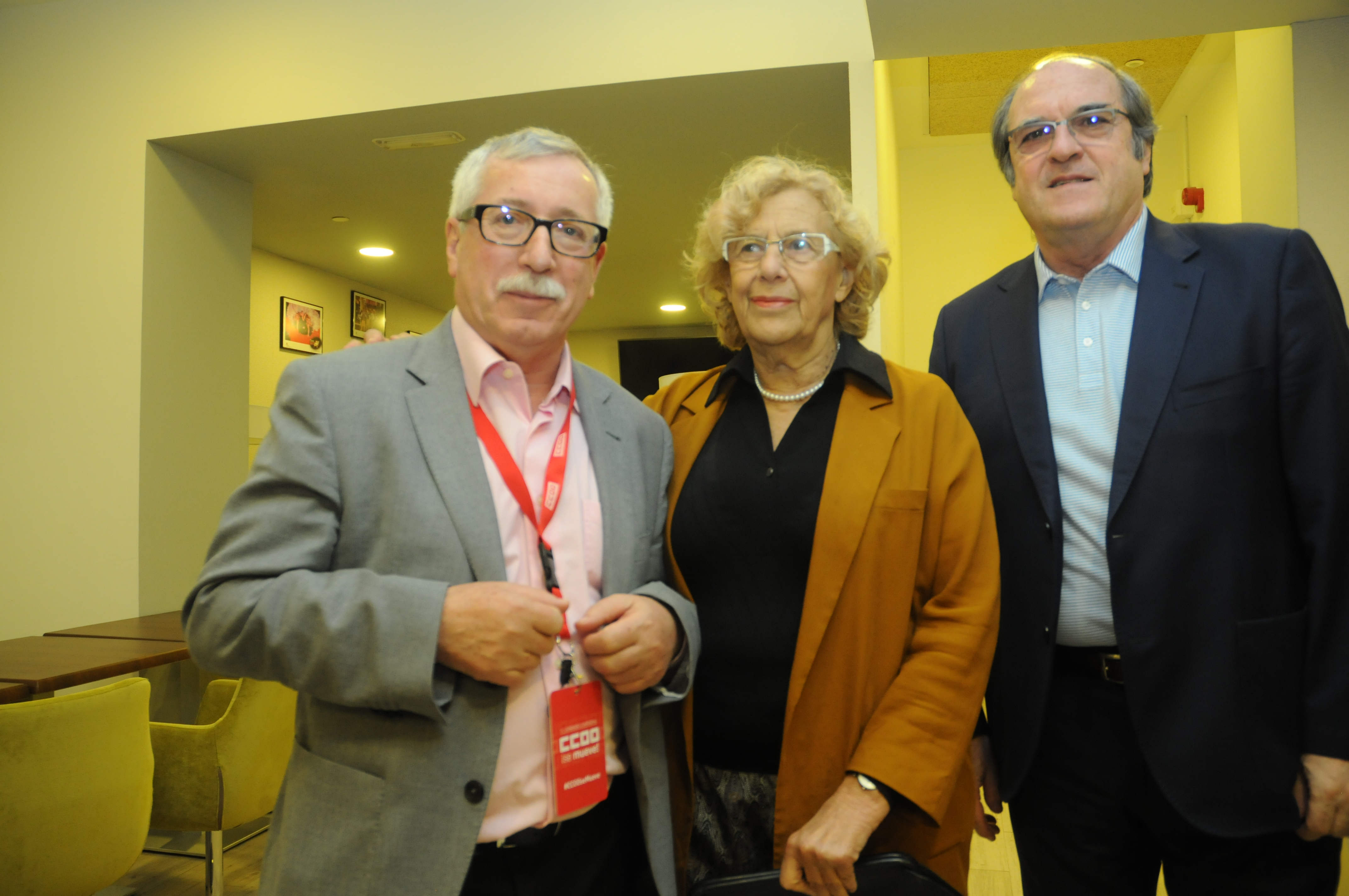 Jornada de clausura del XI Congreso CCOO. Manuela Carmena Alcaldesa de Madrid